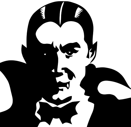 Little vampire